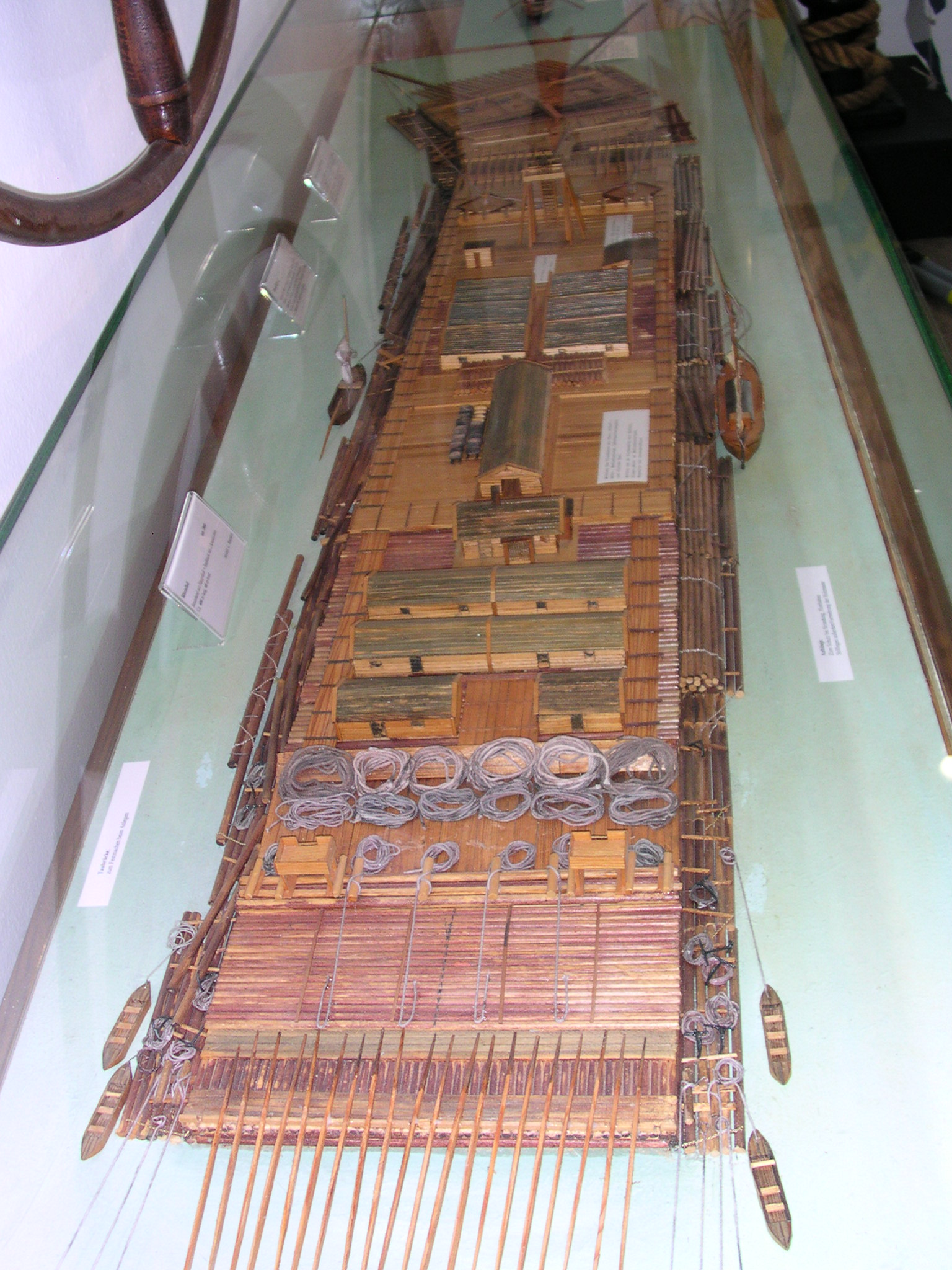 Modell eines “Holländerfloßes” für 500 Personen Besatzung im Rheinmuseum Emmerich, Maßstab 1:200